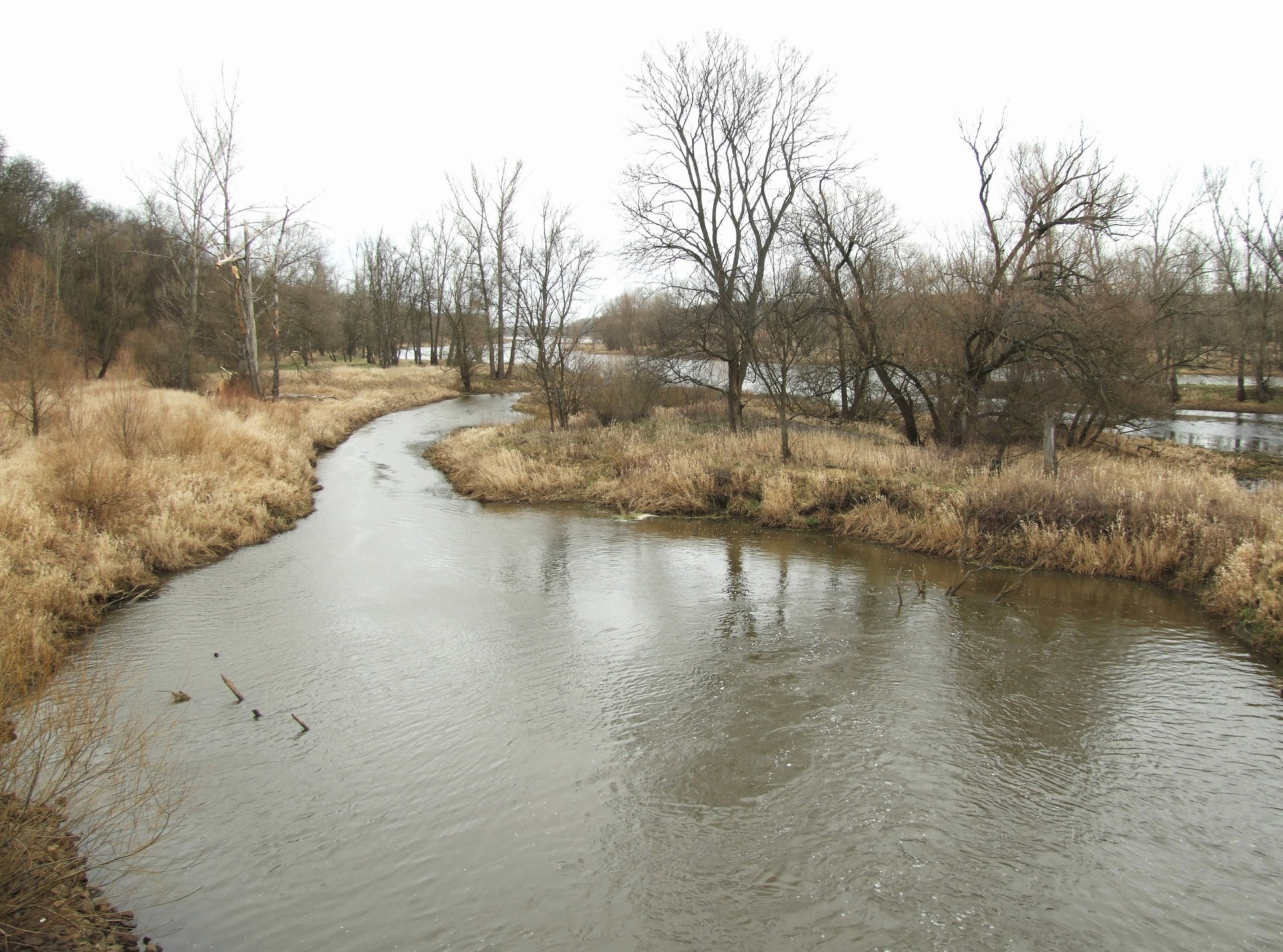 Ujście Śląskiej Ochli do Odry (okolice wsi Bobrowniki - woj. lubuskie) Autor: Mohylek 18:22, 1 February 2007 (UTC)